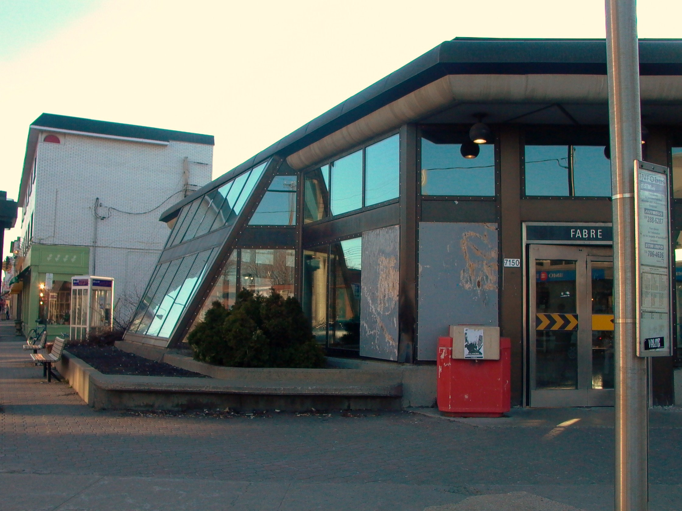 Station Fabre du métro de Montréal.